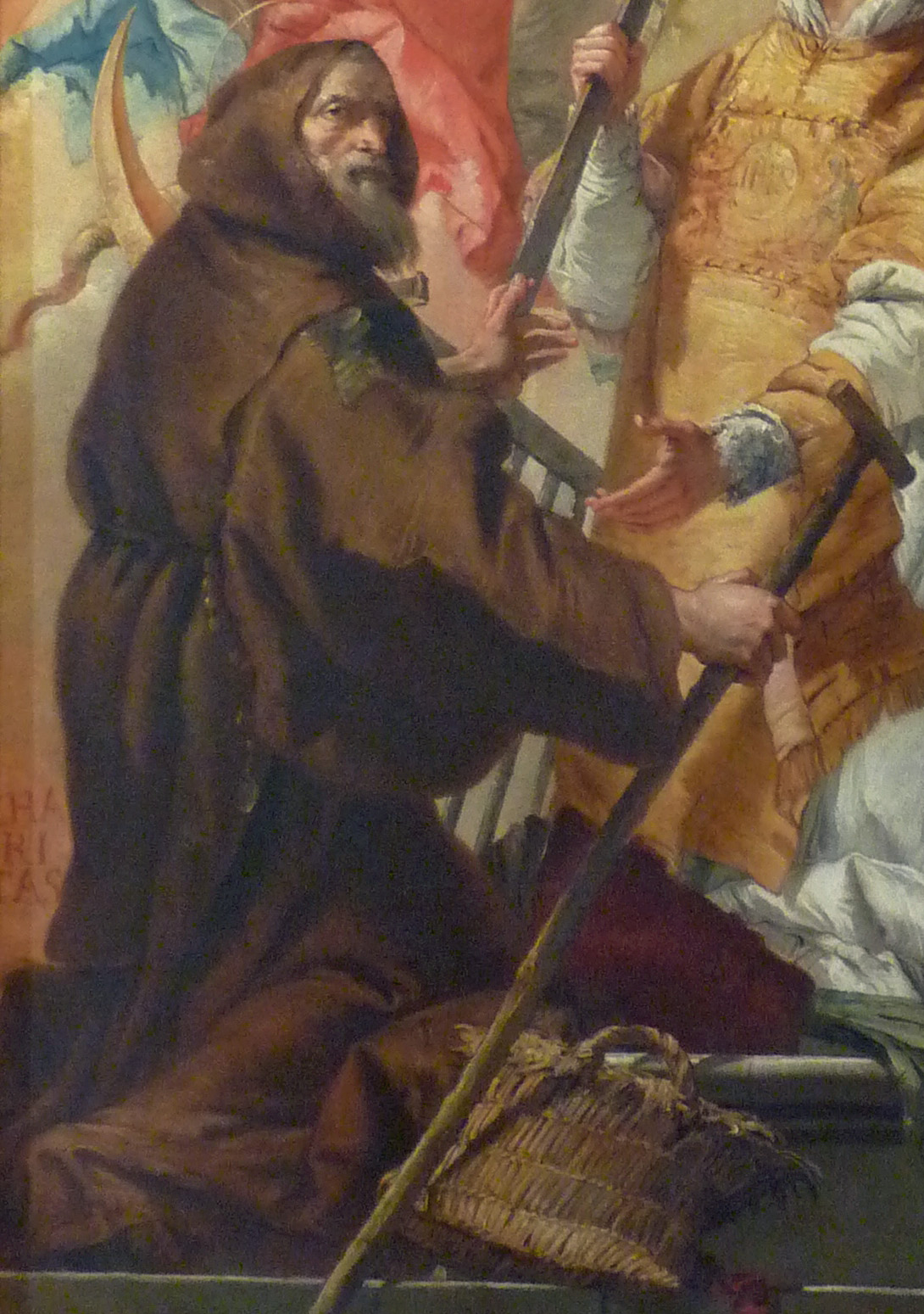 La Vierge en gloire avec saint Laurent et saint François de Pauletitle QS:P1476,fr:"La Vierge en gloire avec saint Laurent et saint François de Paule" label QS:Lfr,"La Vierge en gloire avec saint Laurent et saint François de Paule"